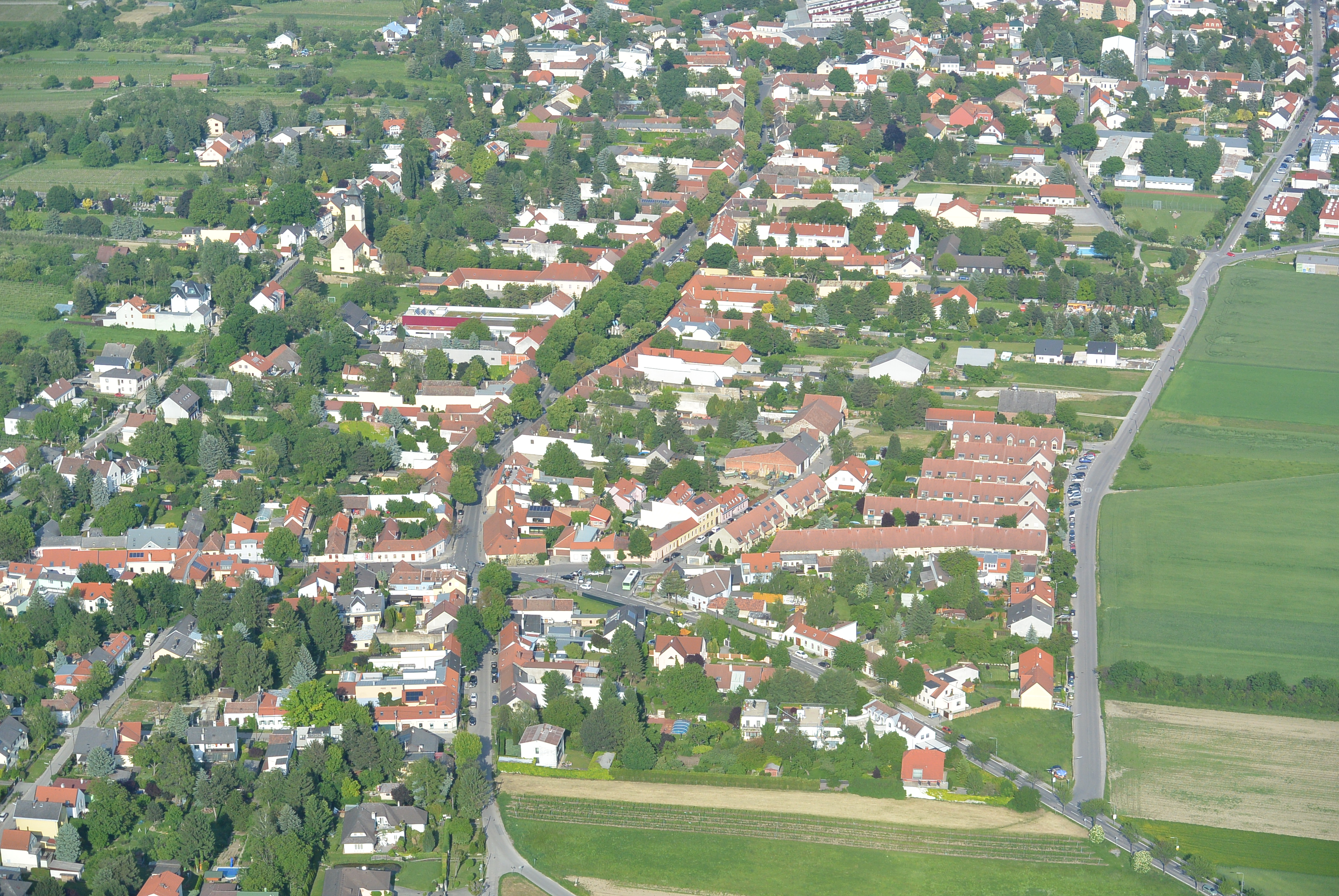 DSC_2406 Luftbild des alten Ortskernes von Stammersdorf